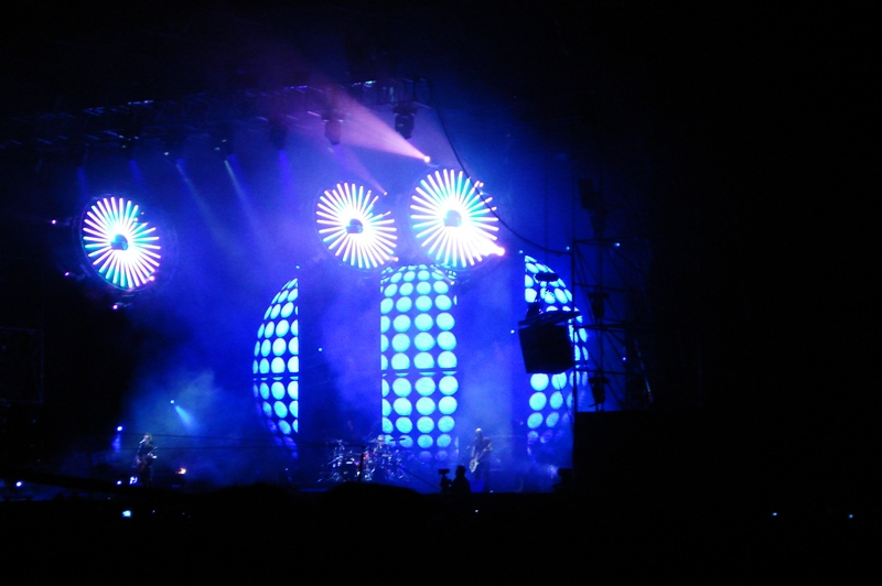 Concierto de Soda Stereo en el Estadio Nacional durante su gira Me verás volver.